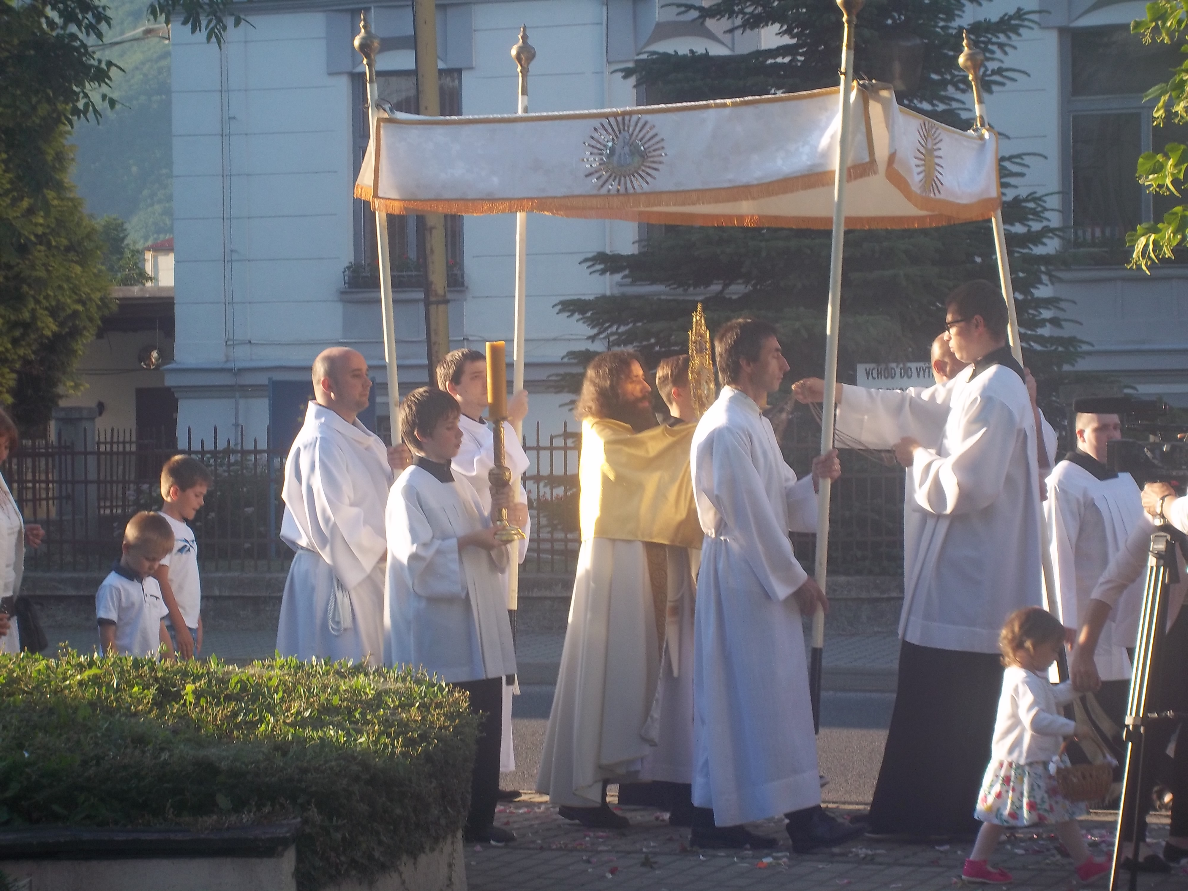 Boże Ciało. Vrútky. Słowacja